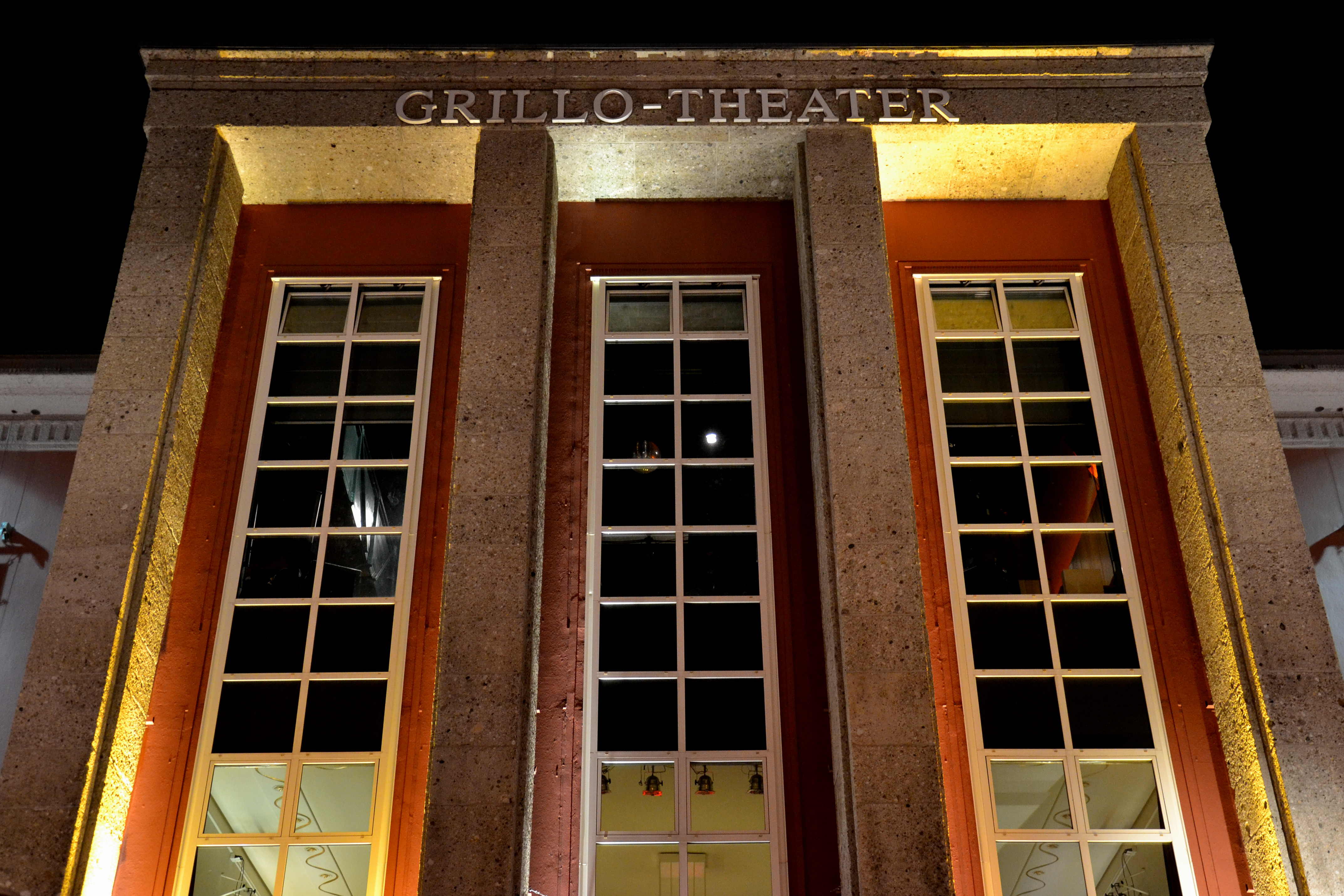 Eingangsportal des Grillo-Theaters im Essener Stadtkern